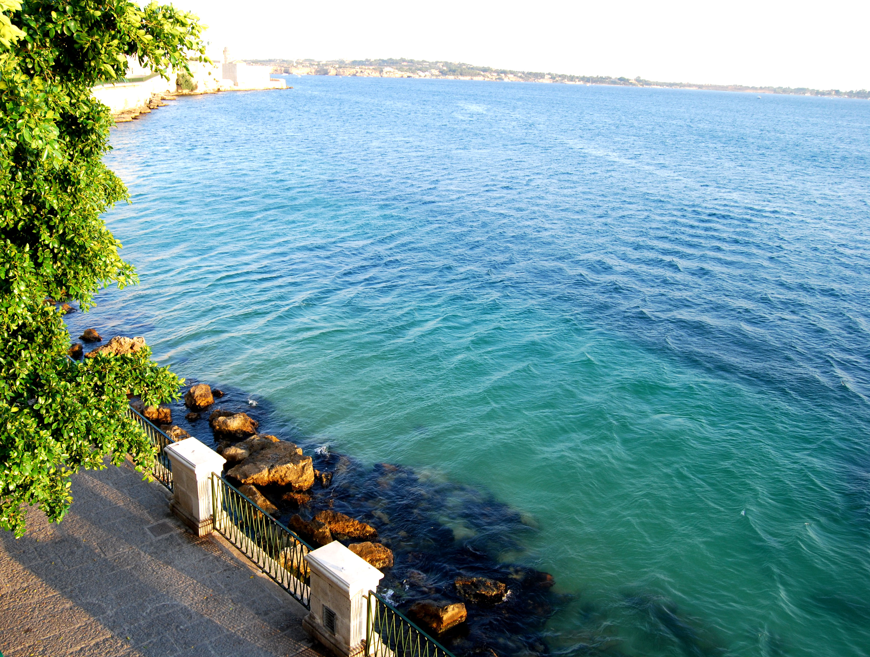 Il mare di Ortigia